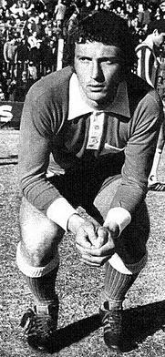 José Néstor Pekerman debutó en Argentinos Juniors en 1968.